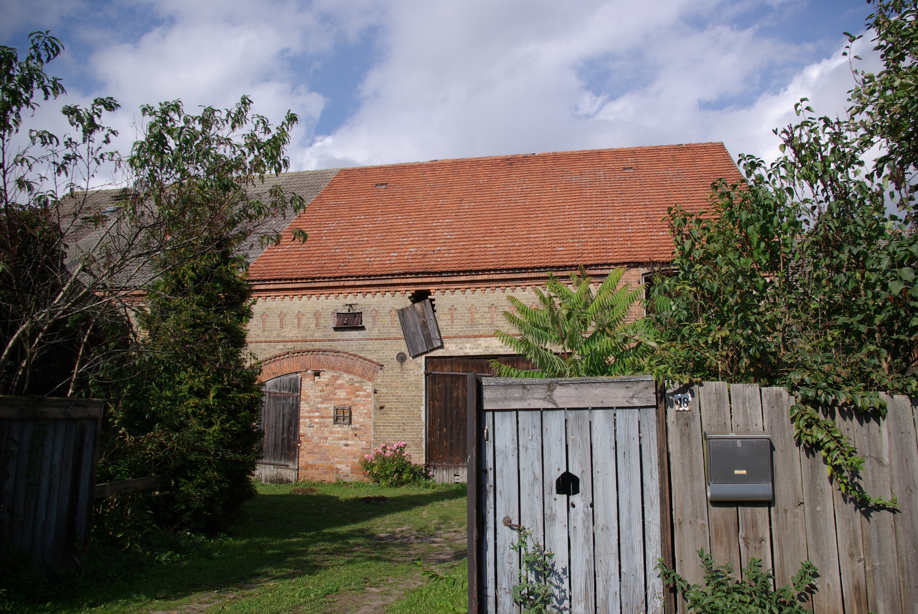 Oderaue Ortsteil Croustillier in Brandenburg. Die Scheune ist Teil der Gutsanlage.